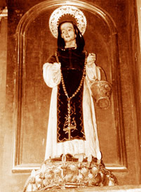 Santo peruano San Juan Macías